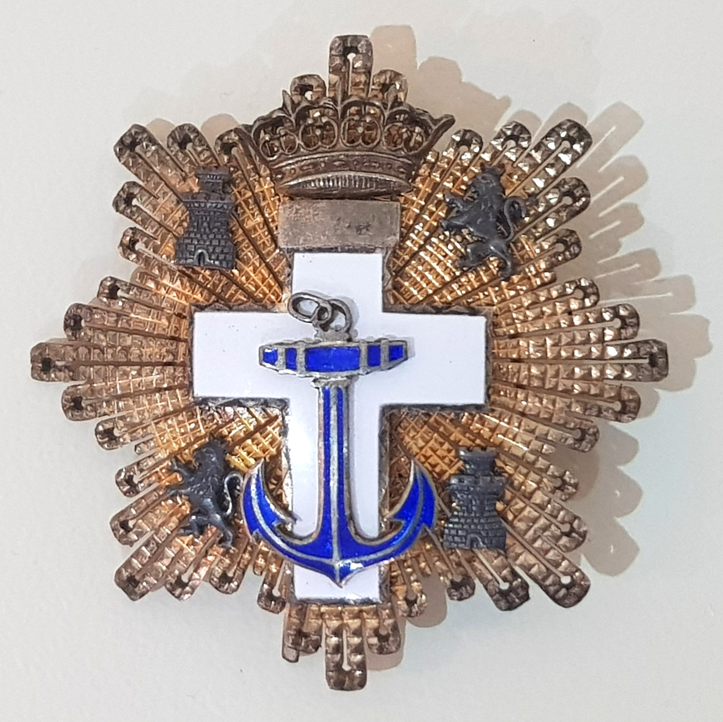 Großkreuz des spanischen Cruz del Mérito Naval. Diese Kategorie konnte verliehen werden an Stabsoffiziere und Zivilisten mit akeademischem oder verwaltungstechnischem äquivalentem Rang. Verleihungen erfolgten 1864-1995. Die hier gezeigte Variante distintivo blanco in der Ausführung 1939-75 war die unterste Klasse.